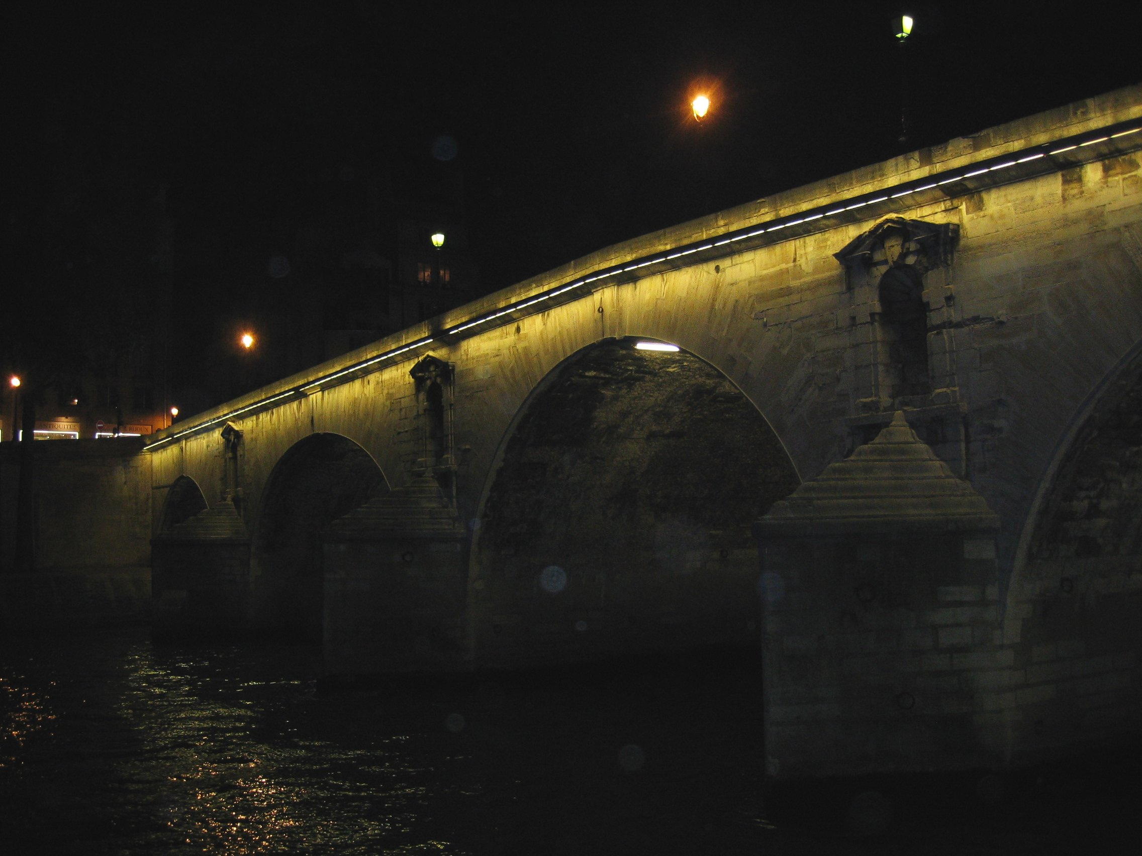 Photo du Pont Marie de nuit.